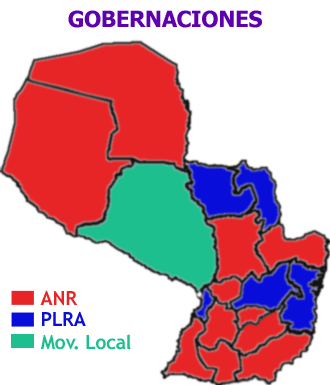 Gobernaciones 2003